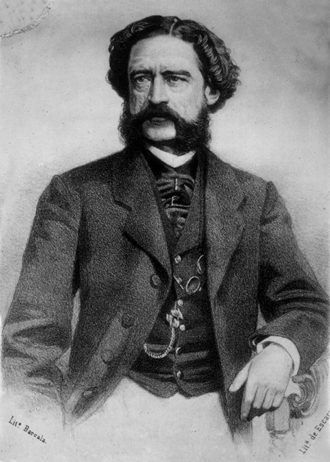 Pedro Demetrio O'Higgins Puga (* Concepción, 1817 - † Lima, 1868), empresario y político chileno, hijo natural del Libertador General don Bernardo O'Higgins y de la dama criolla Rosario Puga.